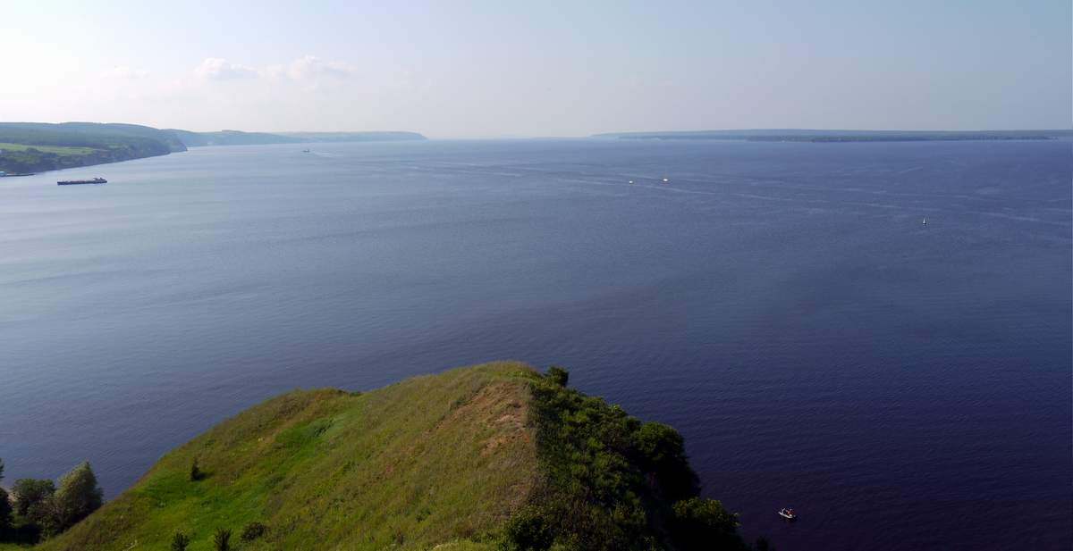 Гора Лобач, в месте слияния рек Волги и Камы.